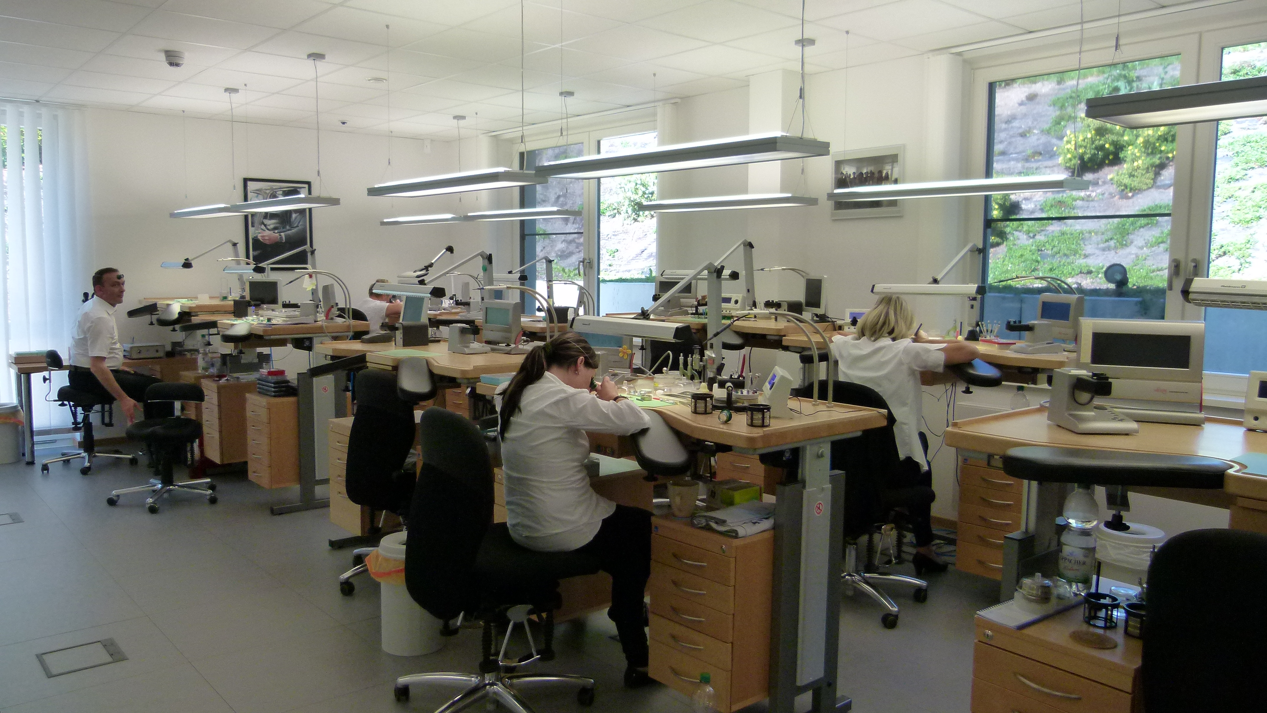 Uhrenhersteller Wempe, Produktionsstandort Glashütte; Sachsen